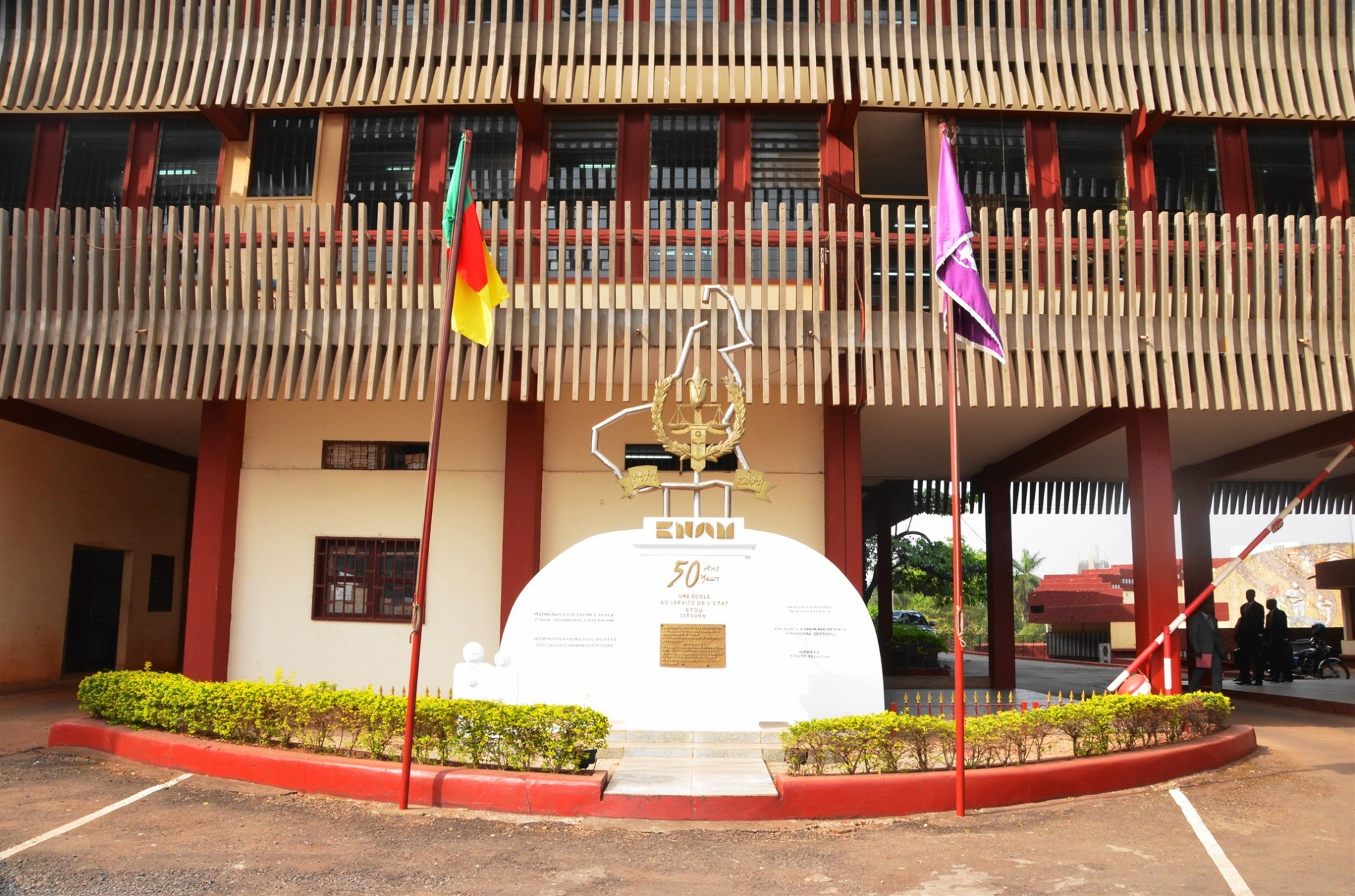 École nationale d'administration et de magistrature (Cameroun)